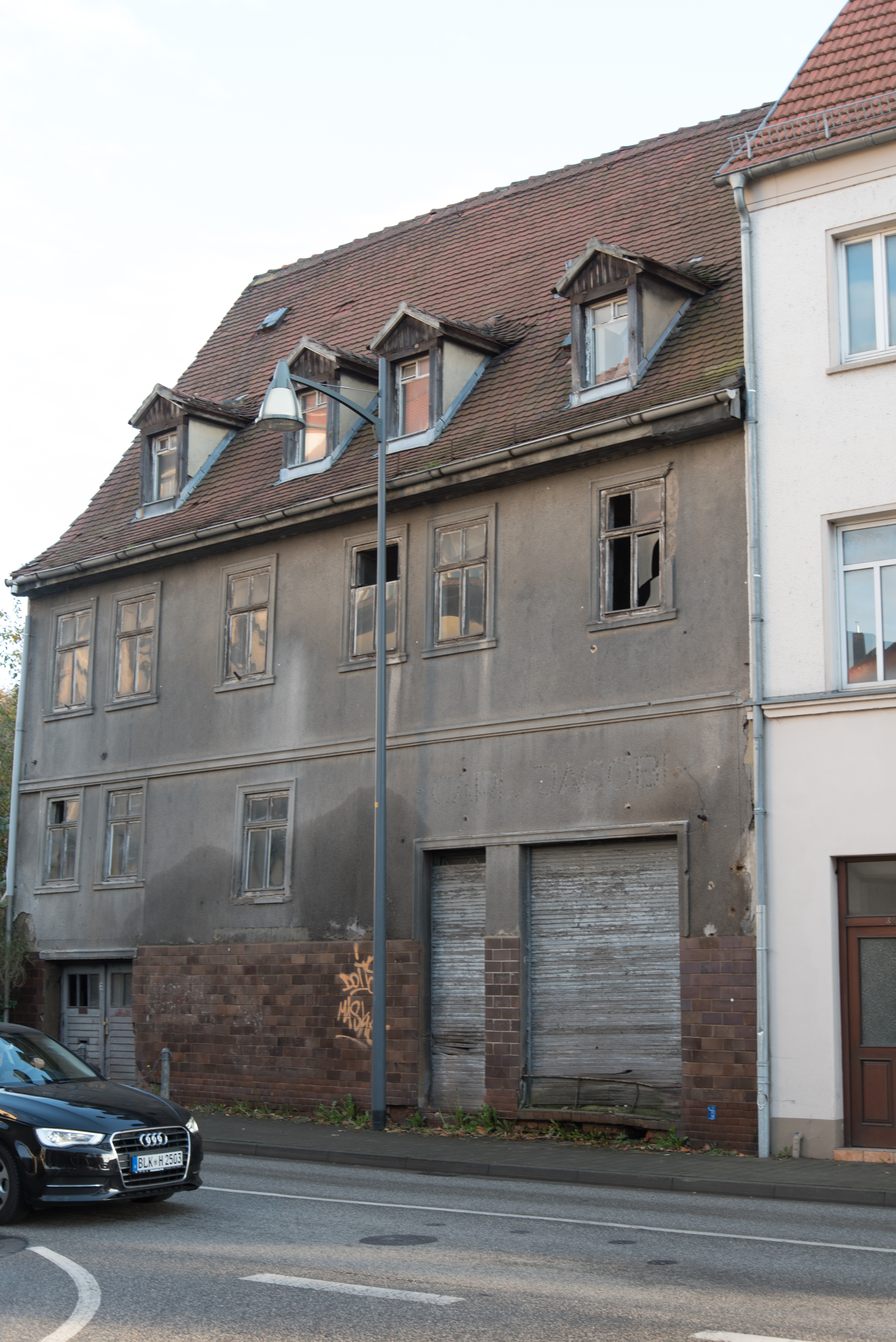 Weißenfels, Nikolaistraße 32